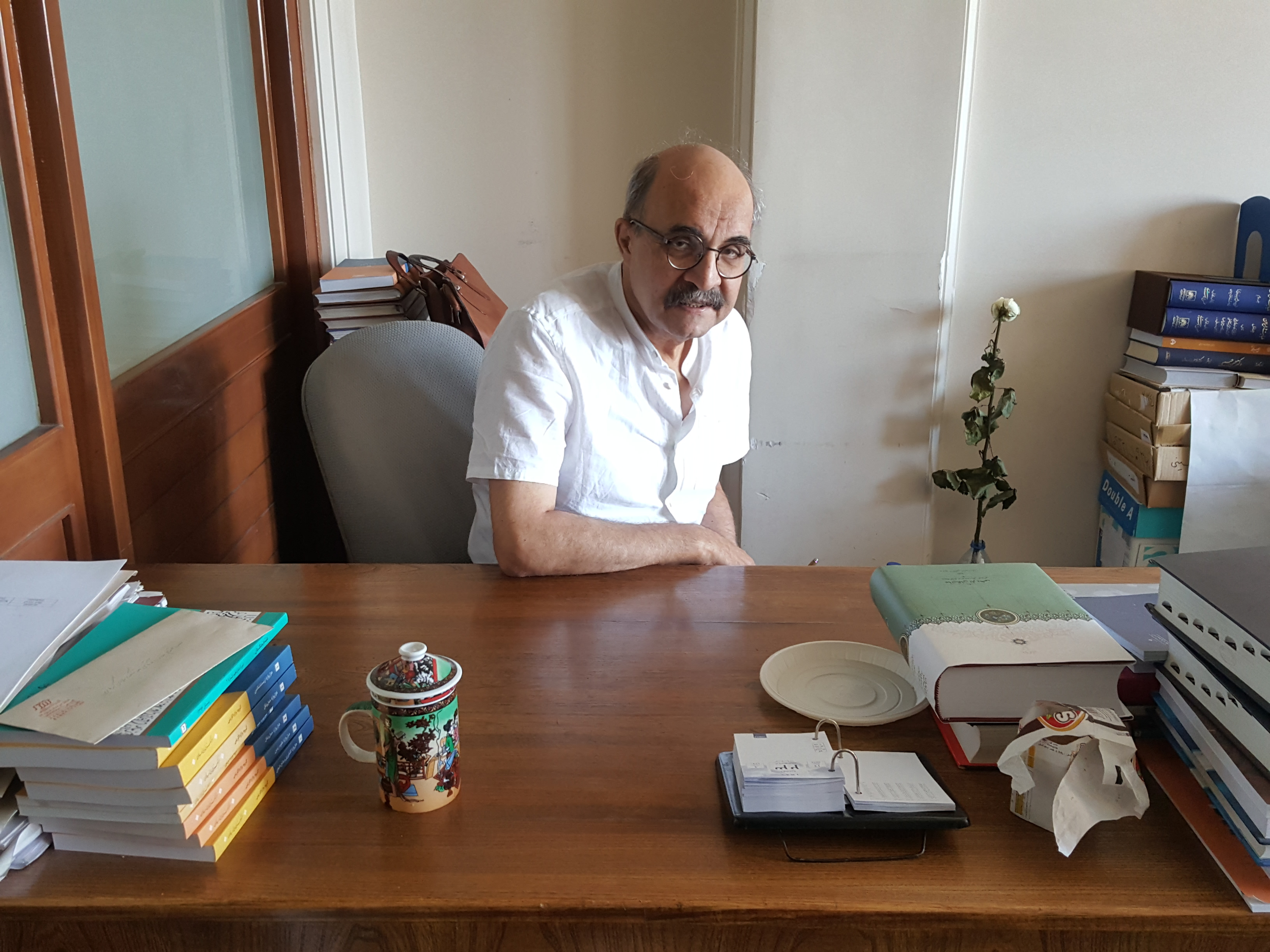 علی کافی در فرهنگستان زبان و ادب فارسی، اردیبهشت هزار و سیصد نود و هشت ـ ب